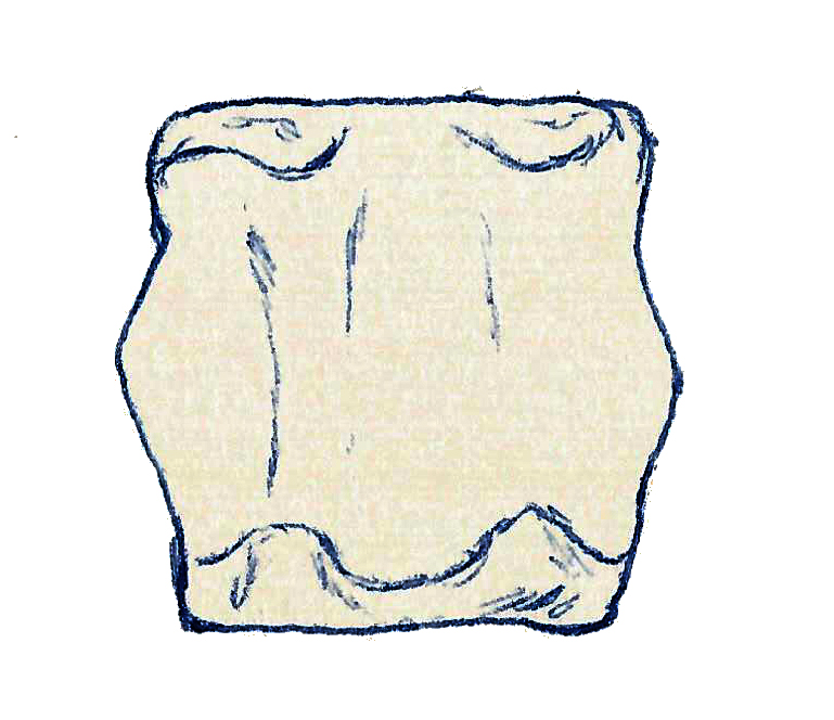 Illustration of a fossil of Eucercosaurus